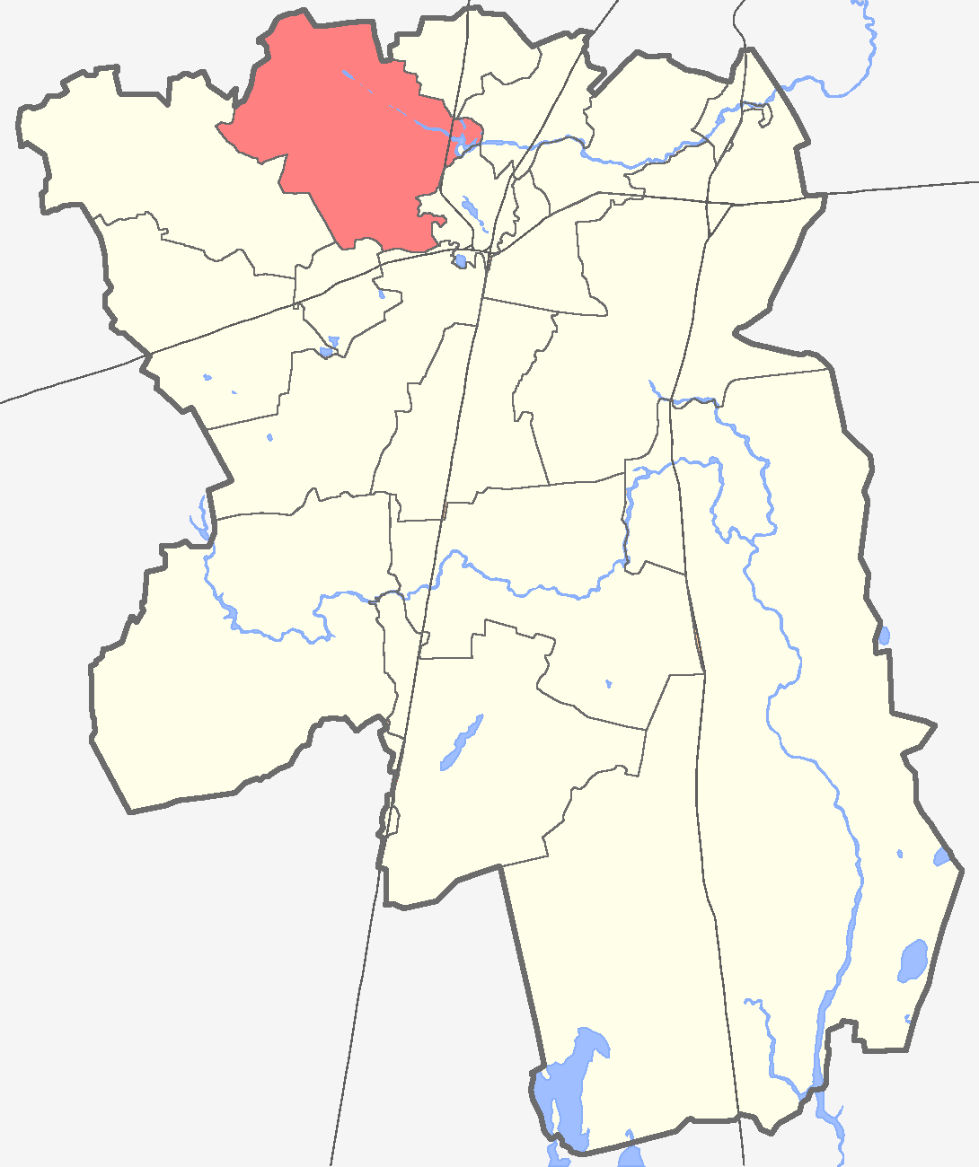 Пудостьское сельское поселение на карте Гатчинского района